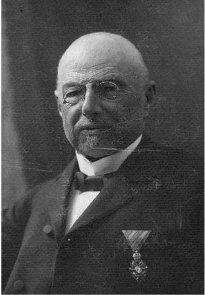 Karel Hail po roce 1880.